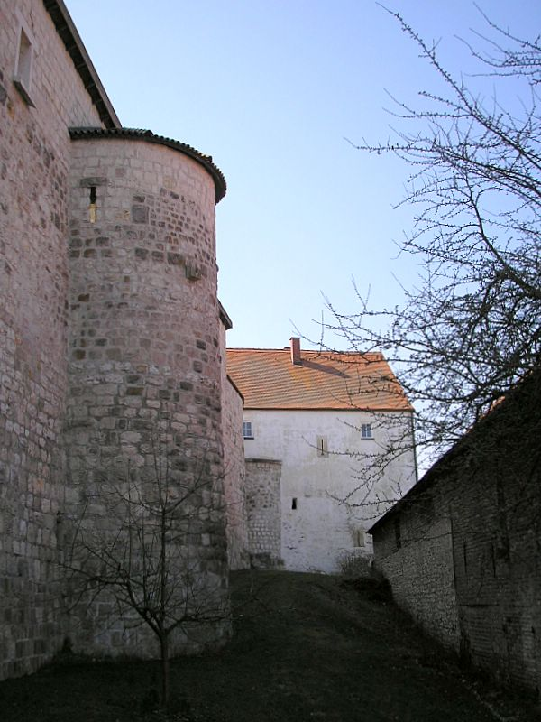 Burg Vohburg (Oberbayern). Der halbrunde Mauerturm neben dem Torbau.